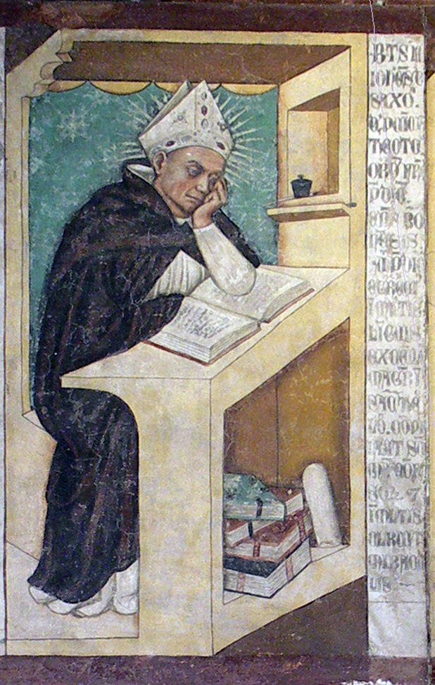 Giovanni di Sassonia, serie dei Quaranta domenicani illustri, ex convento di San Niccolò, Sala del Capitolo, Treviso, 1352 (altezza di ciascun ritratto 150 cm circa)